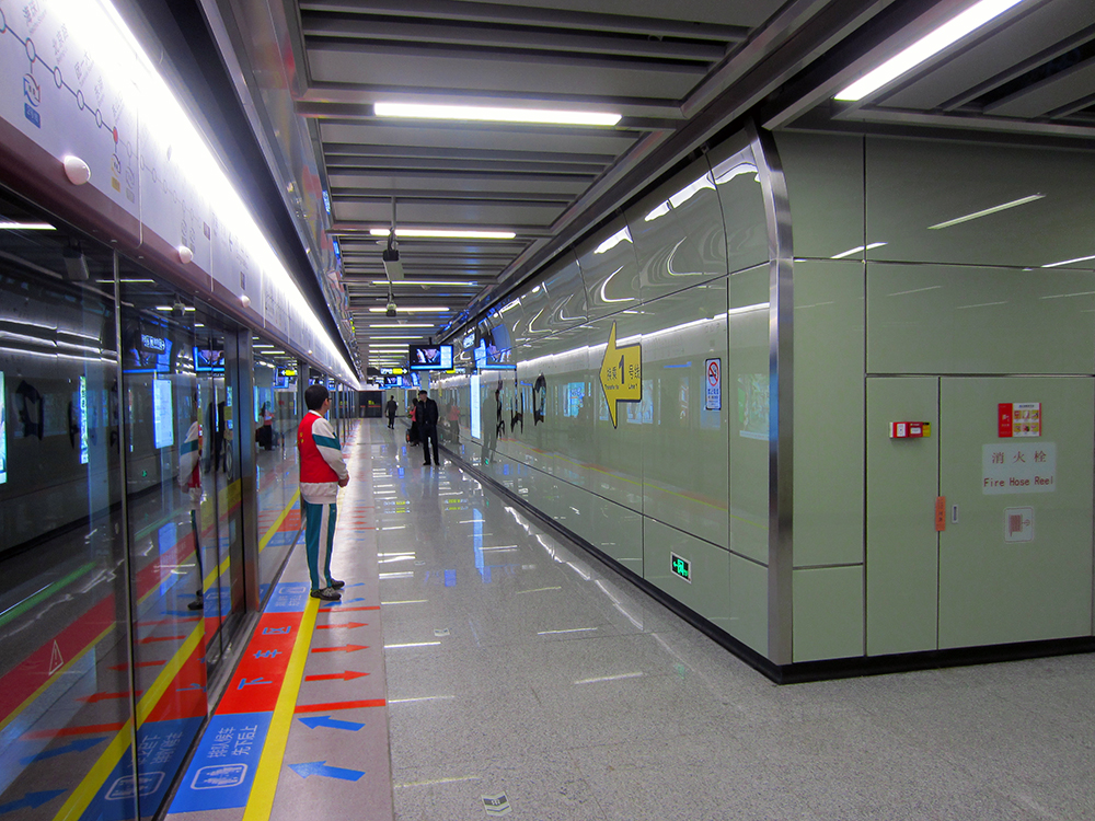 東山口6號線站台